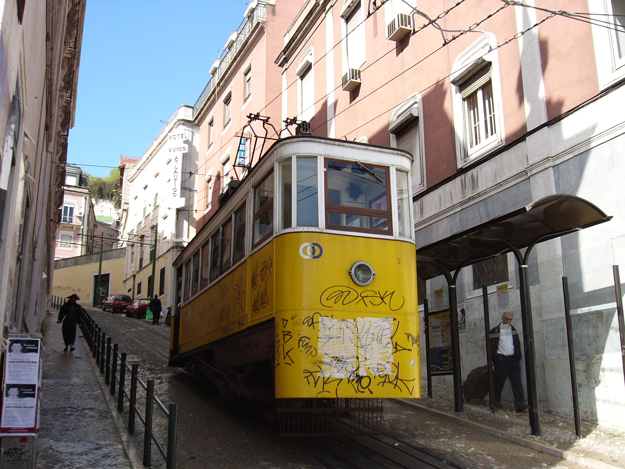 Funicular de Lisboa.